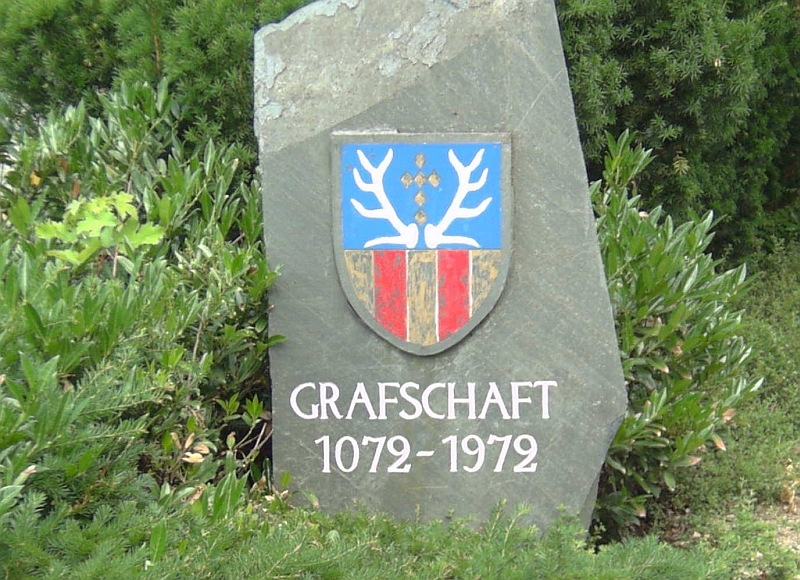 Grafschaft (Schmallenberg) Wappen, Deutschland.